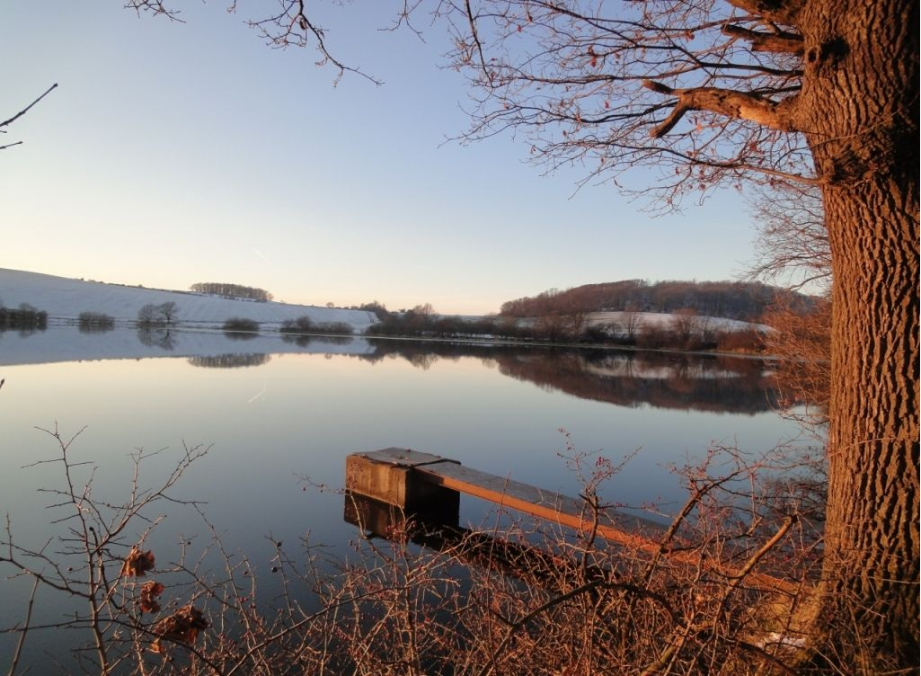 rybník výsovák